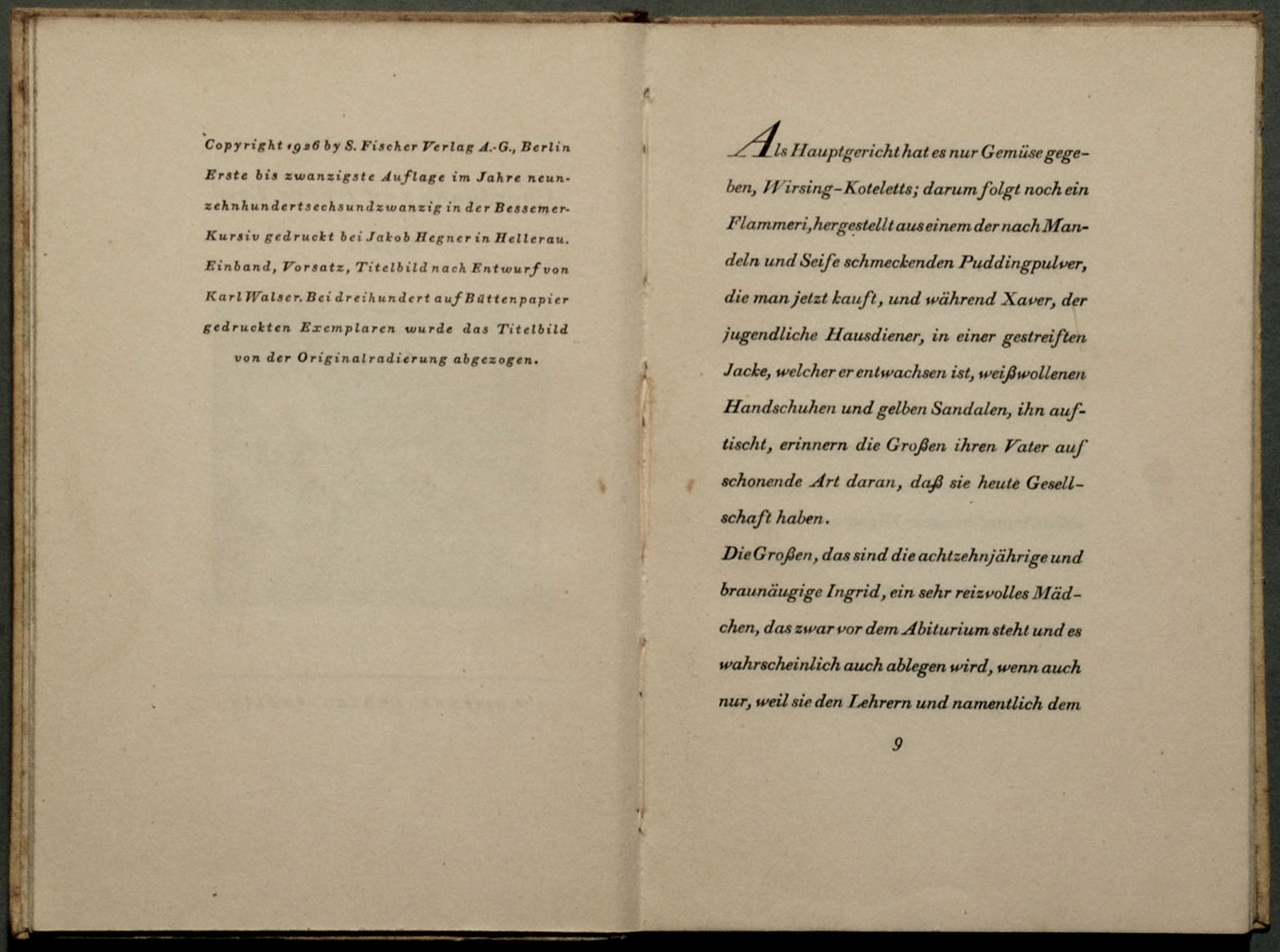 Thomas Mann: Unordnung und frühes Leid. Novelle Berlin: S. Fischer 1926, 127 Seiten. Erste Buchausgabe (Potempa E 29.2, Bürgin I 31, Wilpert/Gühring² 36). Impressum und Anfang der Novelle.